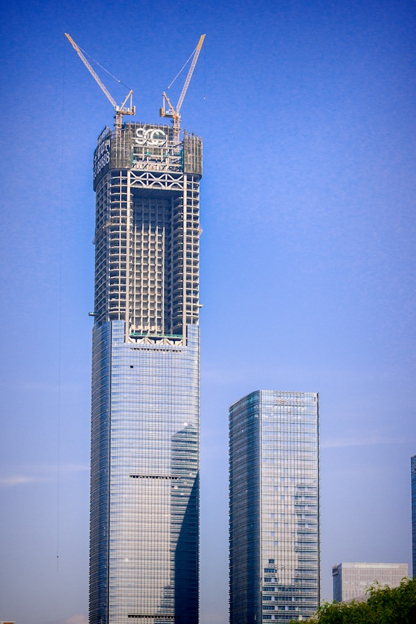 Heung Kong Tower, 2014